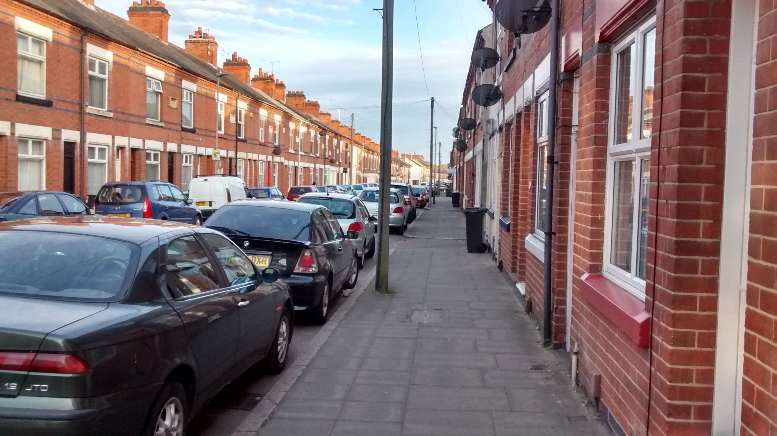 Tudor Road (ulica zamieszkała przez znaczną ilość Polonii)